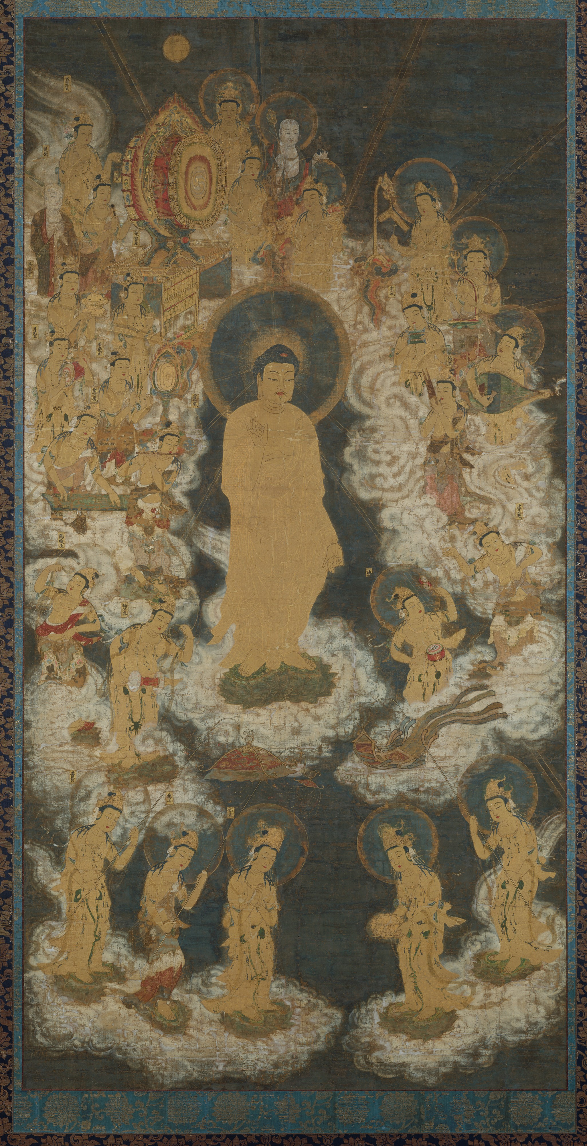 Japan; Hanging scroll; Paintings